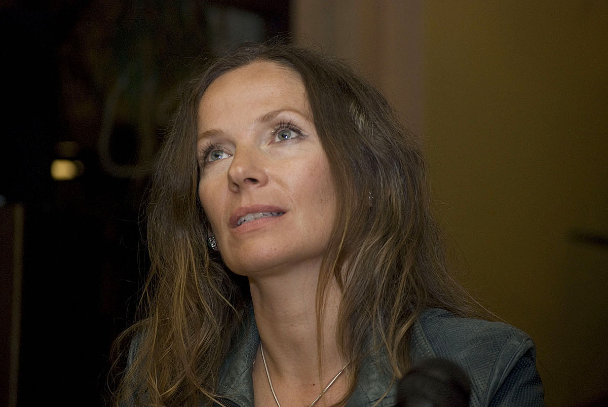 Lesung bei LesArt.Polska im Taranta Babu in Dortmund am 4.5.2012, Foto von Hartmut Salmen